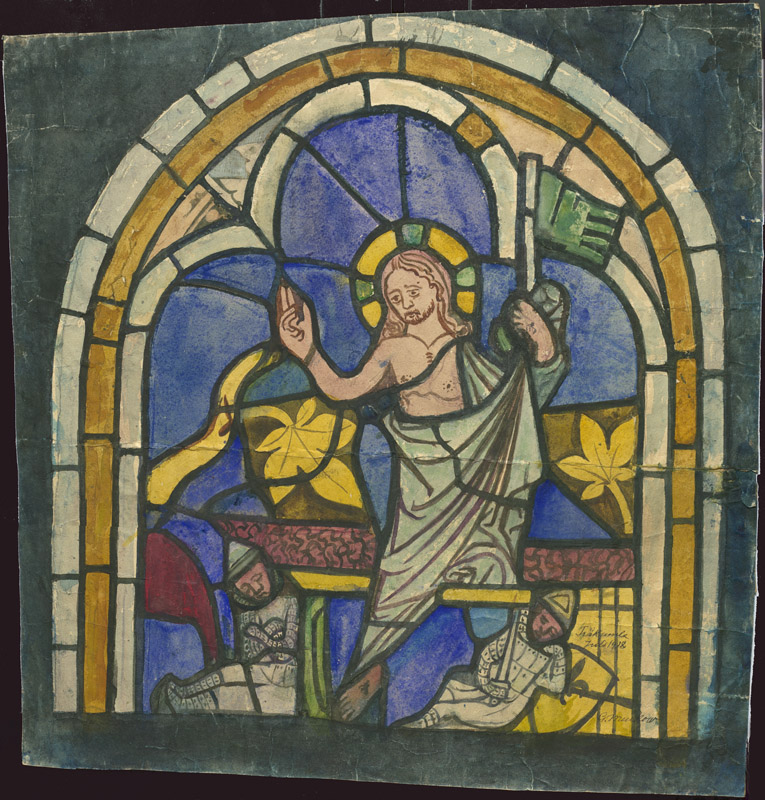 Kristi uppståndelse. Medeltida glasmålning i korets östfönster. Efter restaurering. Akvarell av Gustava Meukow juli 1918. Motiv: Träkumla kyrka Kategori: Akvarell, (03) Glasmålningar Kristi uppståndelse. Medeltida glasmålning i korets östfönster. Efter restaurering. Akvarell av Gustava Meukow juli 1918.